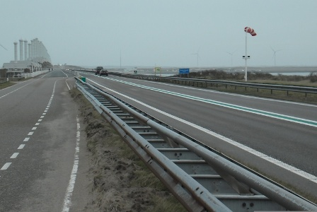 De Rijksweg 57/N57, het fietspad en de autorijbanen. Links de Oosterscheldekering